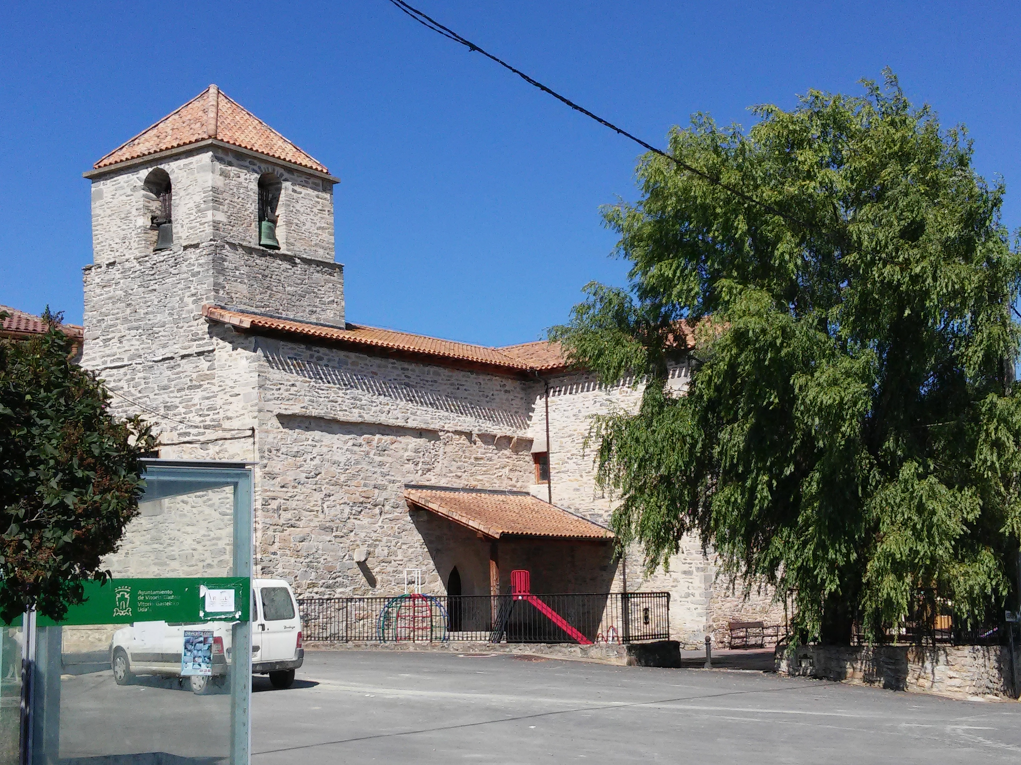 Mandoia herria (Gasteiz)